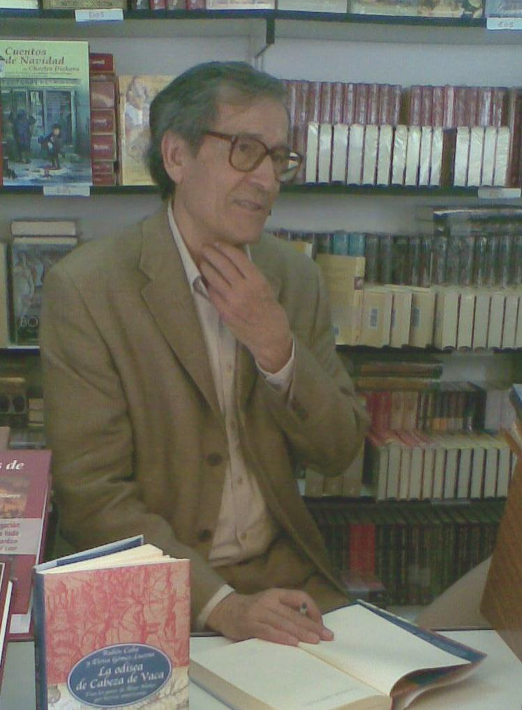 Rubén Caba. Feria del Libro de Madrid. 15 junio de 2008.